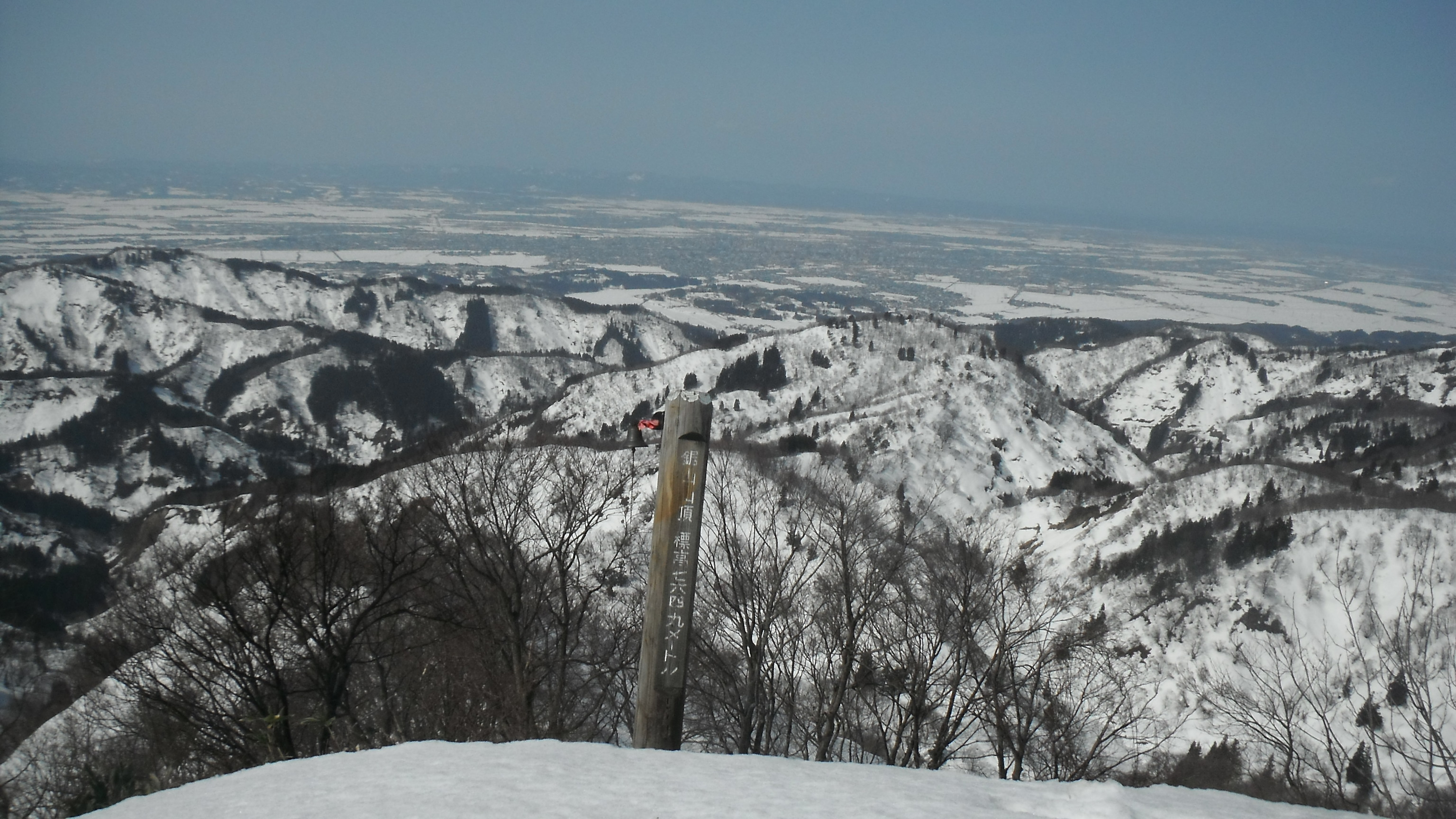 鋸山山頂から西側の展望